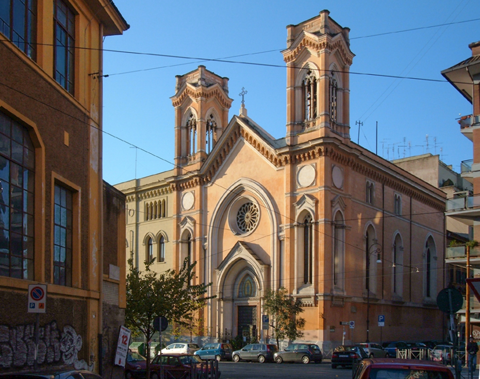 Chiesa di Santa Maria Immacolata all'Esquilino, a Roma, nel rione Esquilino, in via Emanuele Filiberto.